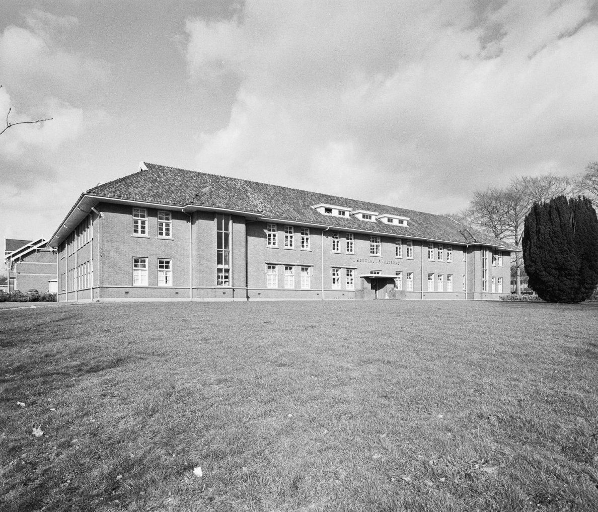 P.L. BERGANSIUS KAZERNE: Exterieur OVERZICHT VOORGEVEL